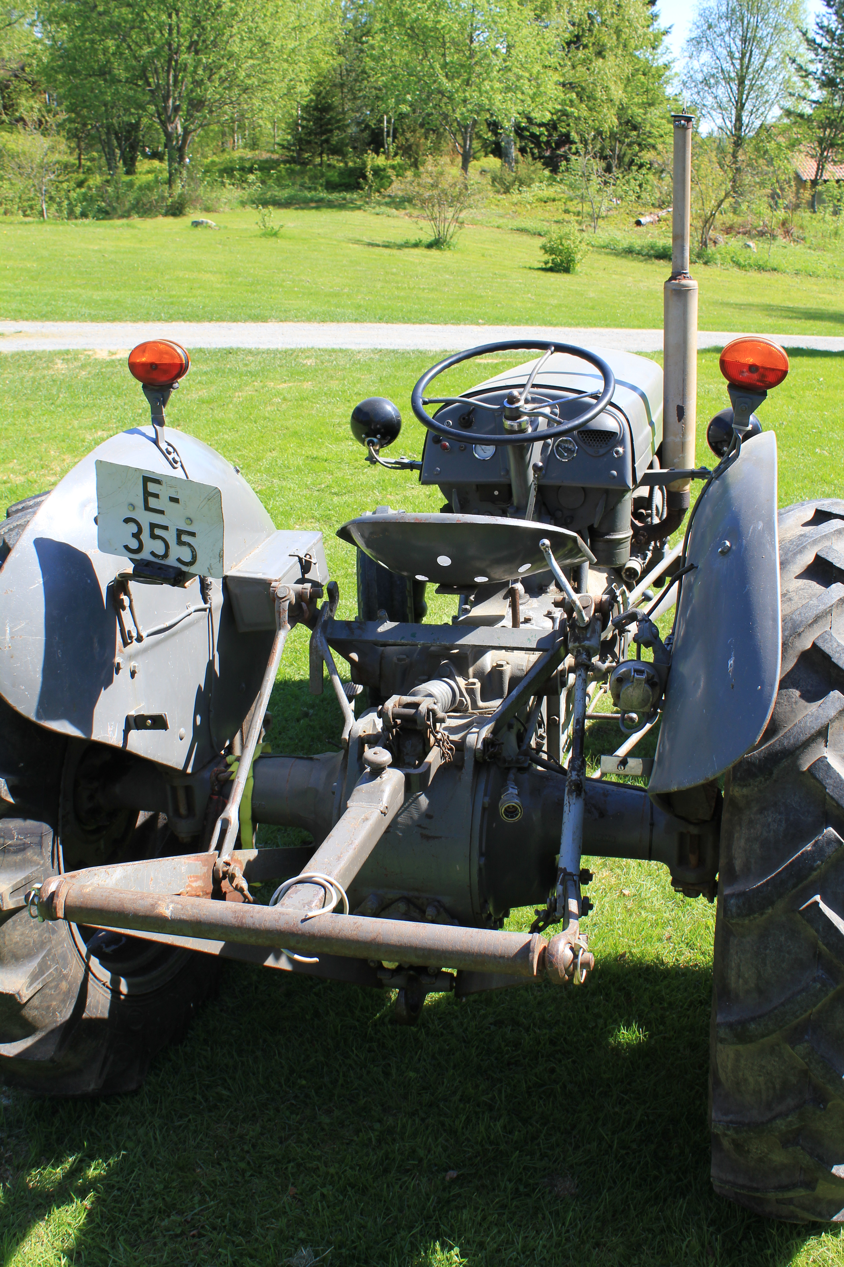 Gråtass.